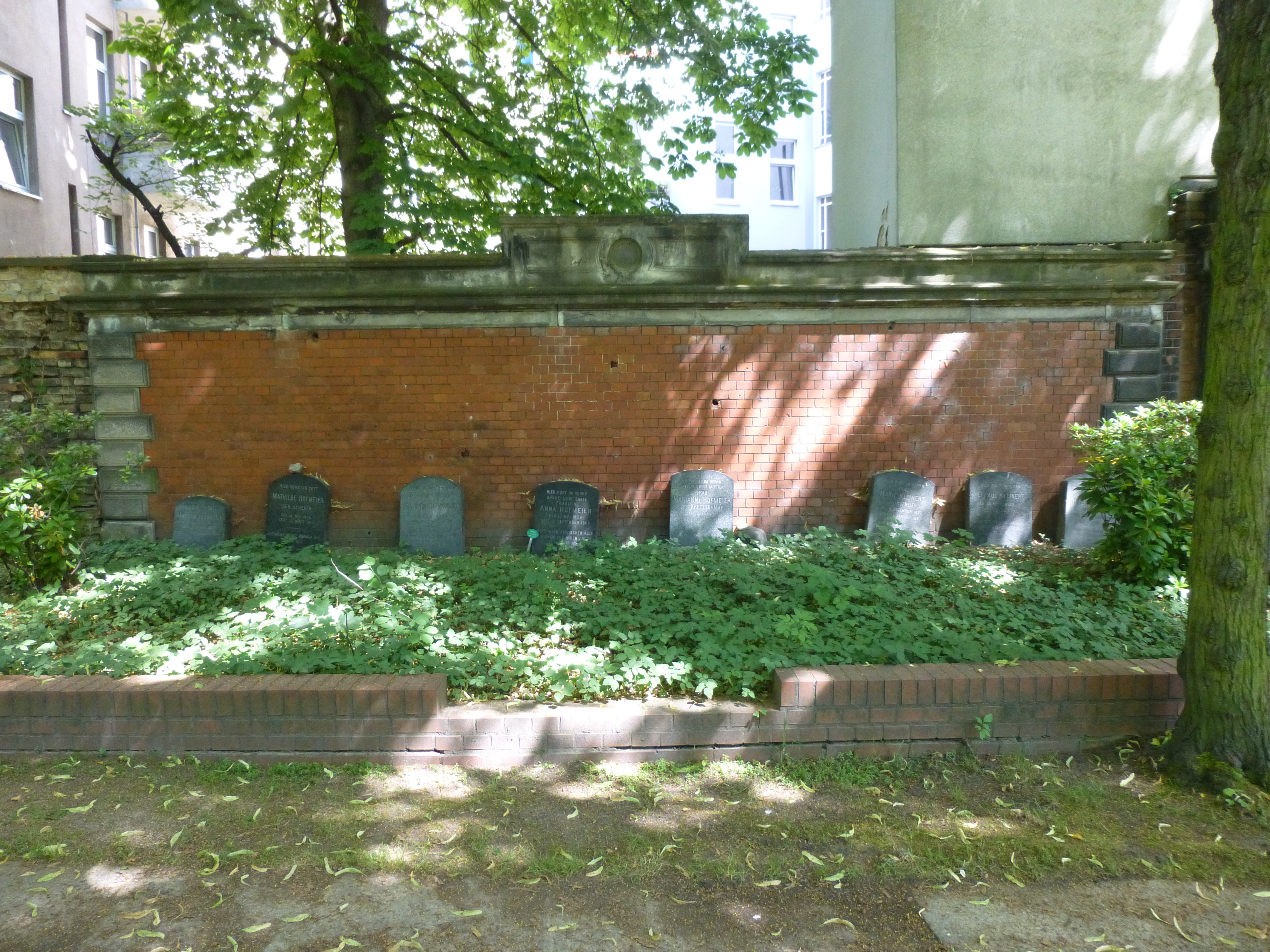 Alter St.-Matthäus-Kirchhof Berlin, Familiengrab Paul Kleinert (Theologe), Foto: Wolfgang Schindler